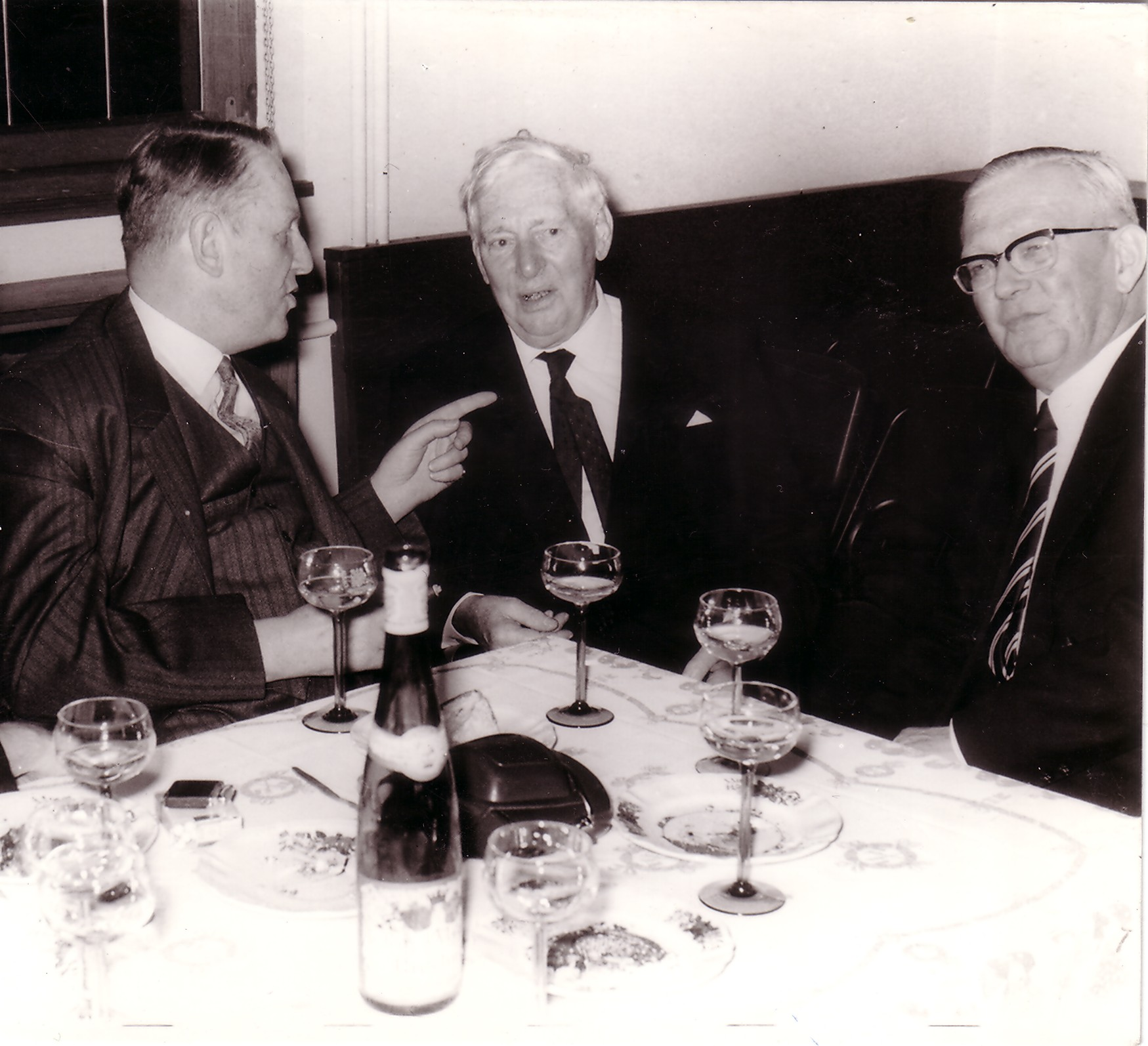 Heinz-Eberhardt Andres, Paul Bertololy und Horst Schiller (von links) nach der Verleihung des Oberrheinischen Kulturpreises an Bertololy in Freiburg i. Br. beim Ausklang in Bennwihr.